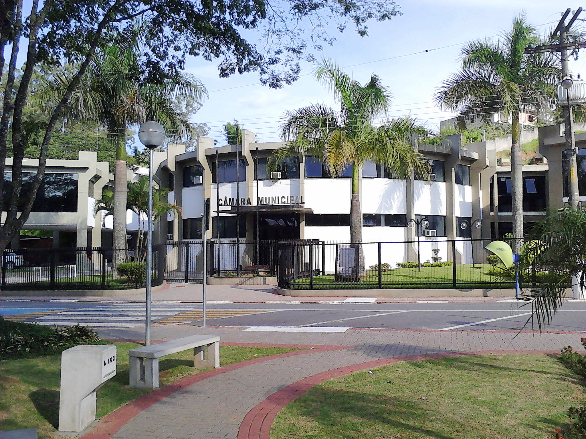 Câmara Municipal de Arujá, SP, Brasil.